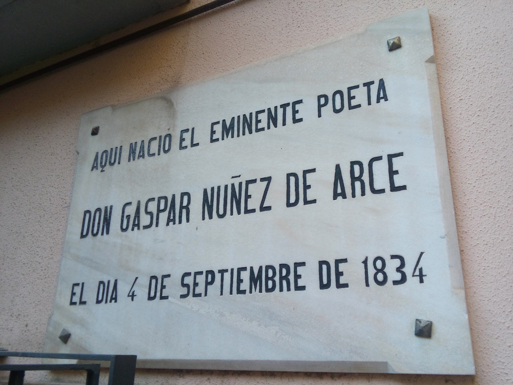 Placa en la casa donde nació Gaspar Nuñez de Arce (en el actual Colegio de Enfermería de Valladolid).